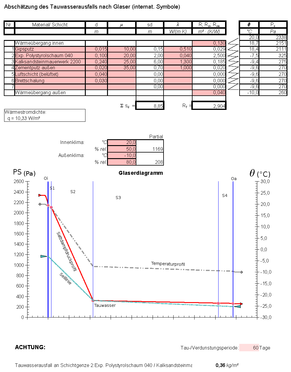 Beispiel für eine grafische Berechnung des Tauwasserausfalls nach Glaser (Bauphysik); Umgestellt von DIN 4108-1 (1981) auf internationale Symbole.